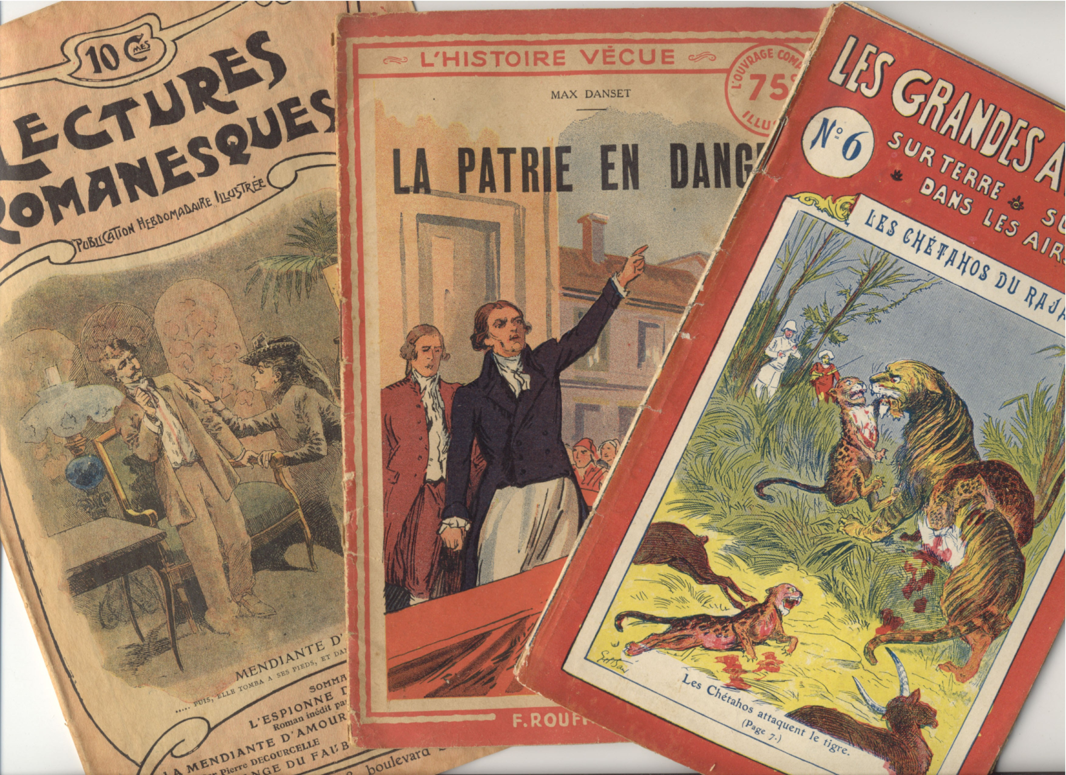 Il s'agit du scan de trois ouvrages qui sont passés dans le domaine public. Ils datent tous du début du XXe siècle.